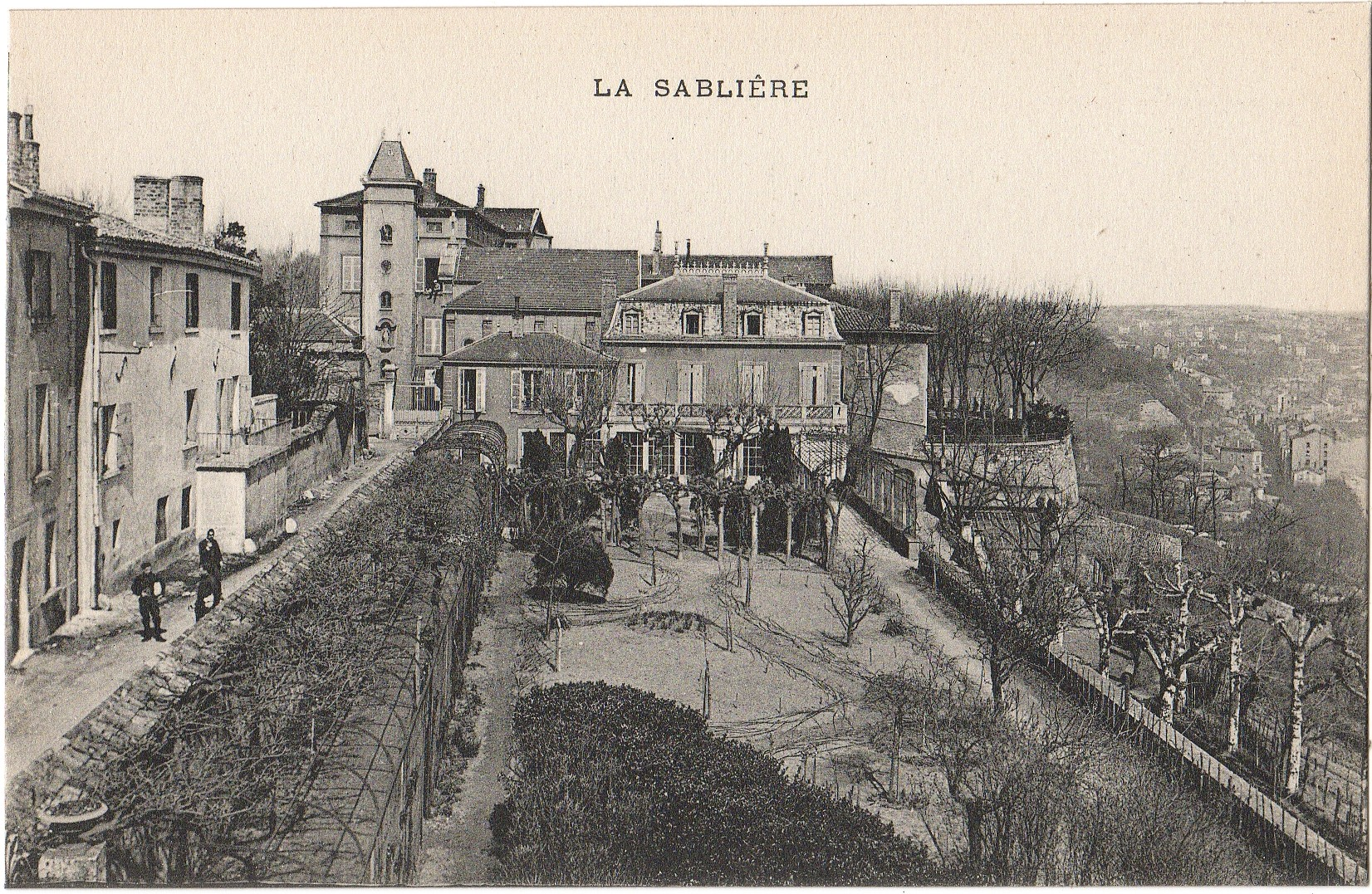 Cette carte postale montre la propriété familiale de la Sablière vers 1910 sise à Caluire-et-Cuire, elle était réservée aux propriétaires qui l'utilisaient comme carte de correspondance. Cette propriété est privée et appartient à la même famille depuis 1849.